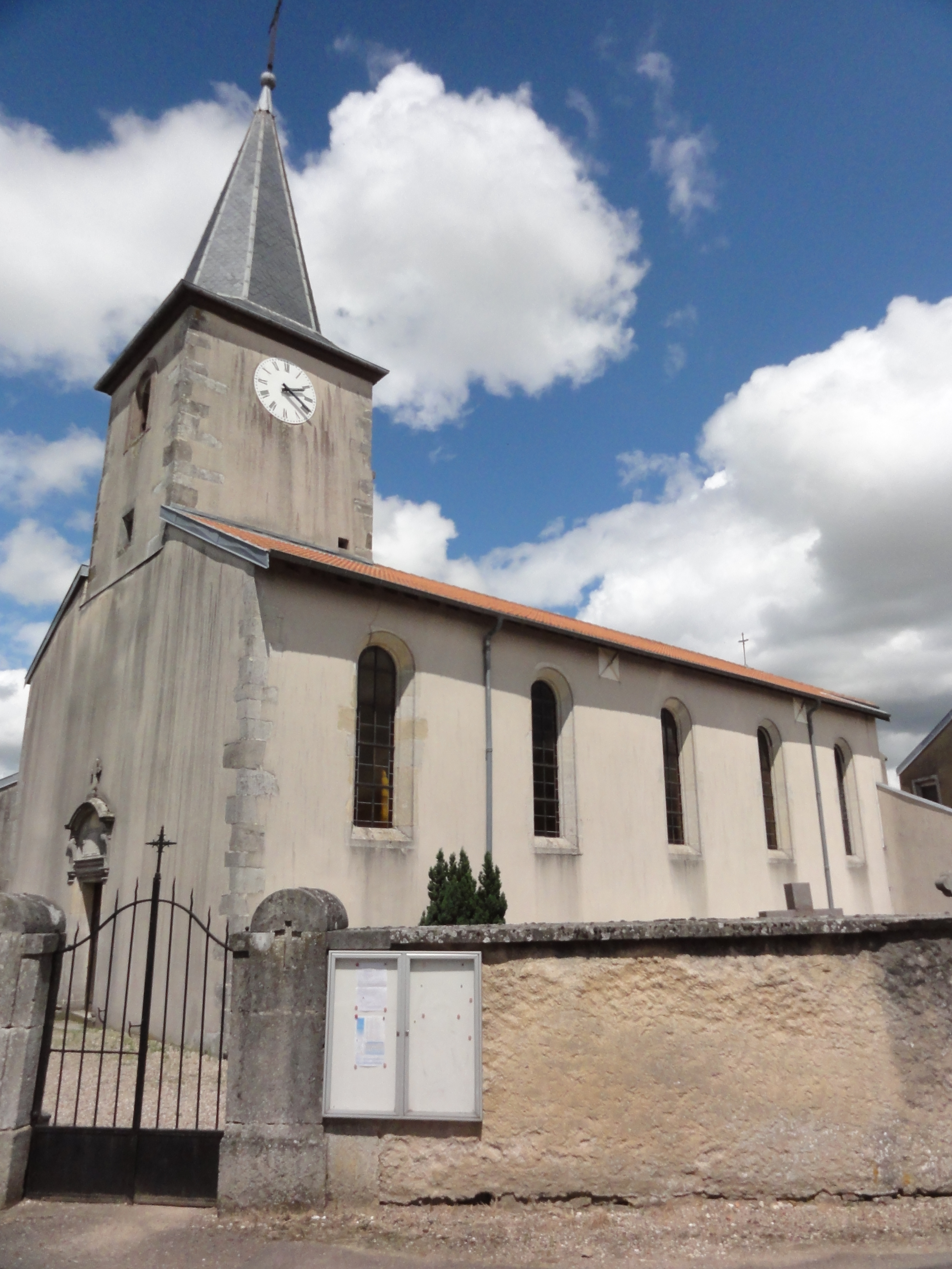 Burthecourt-aux-Chênes (M-et-M) église, extérieur